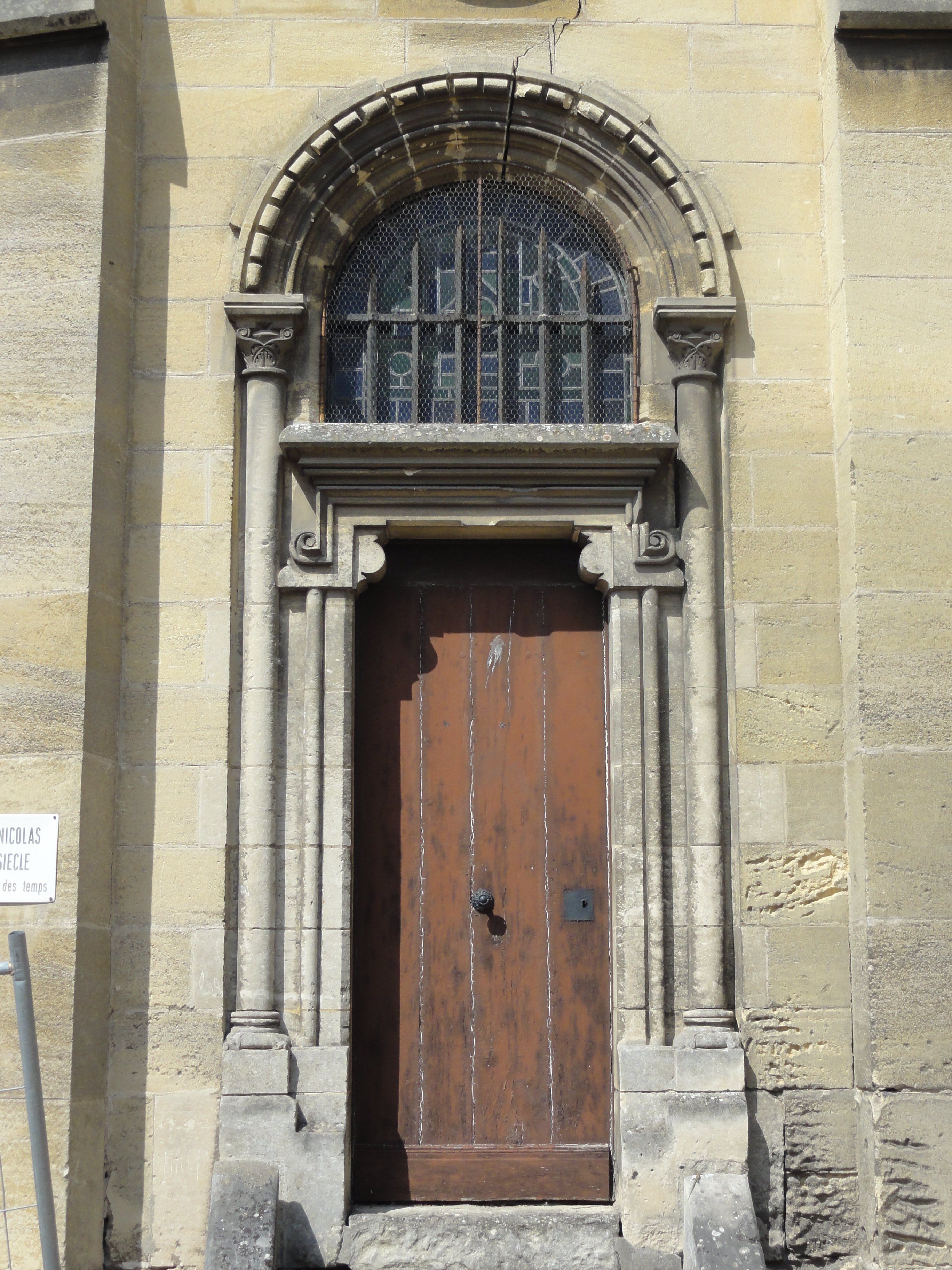 Le portail de la sacristie de 1878.